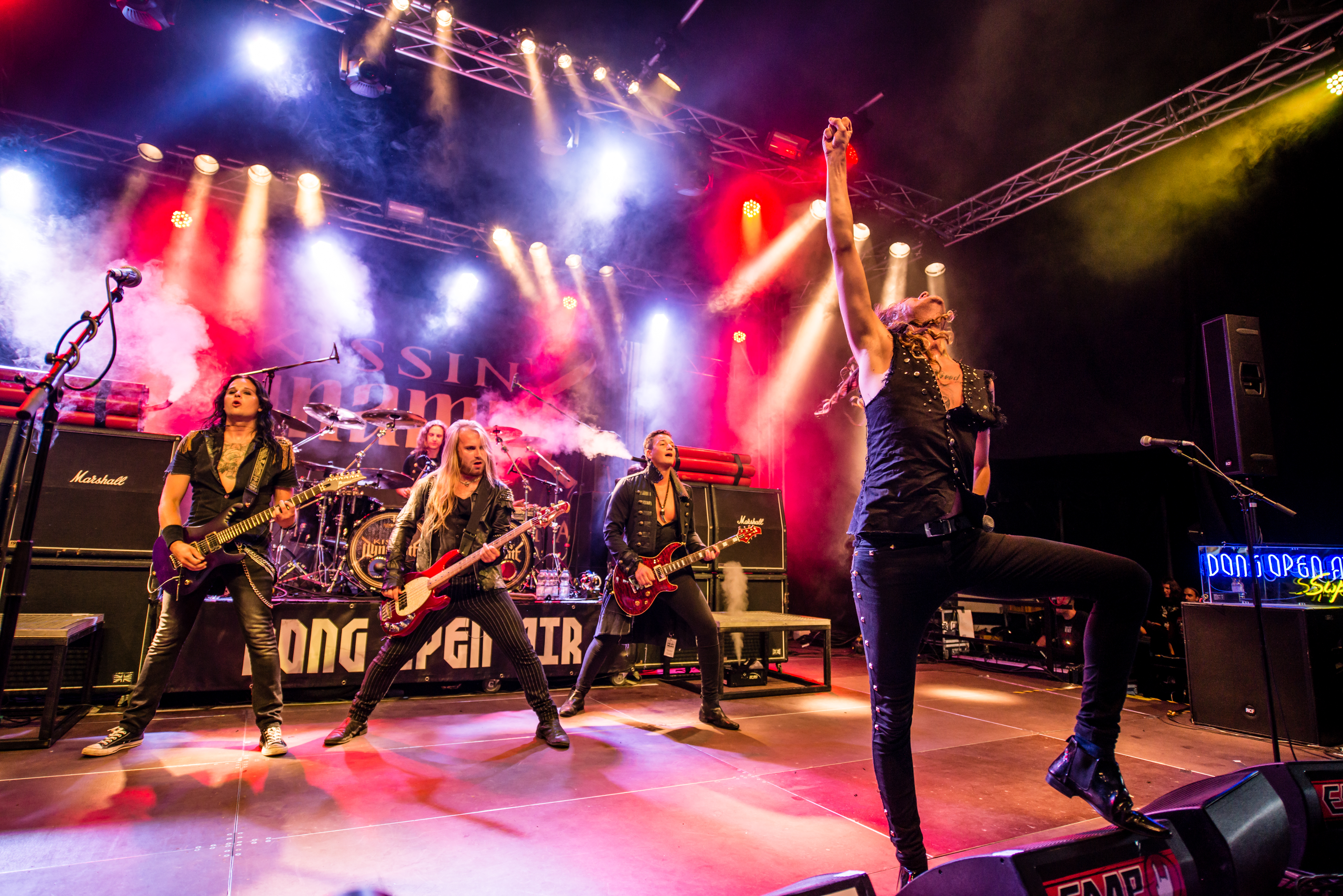 'Dong Open Air 2015; Neukirchen-Vluyn Halde Norddeutschland': 'Kissin' Dynamite'